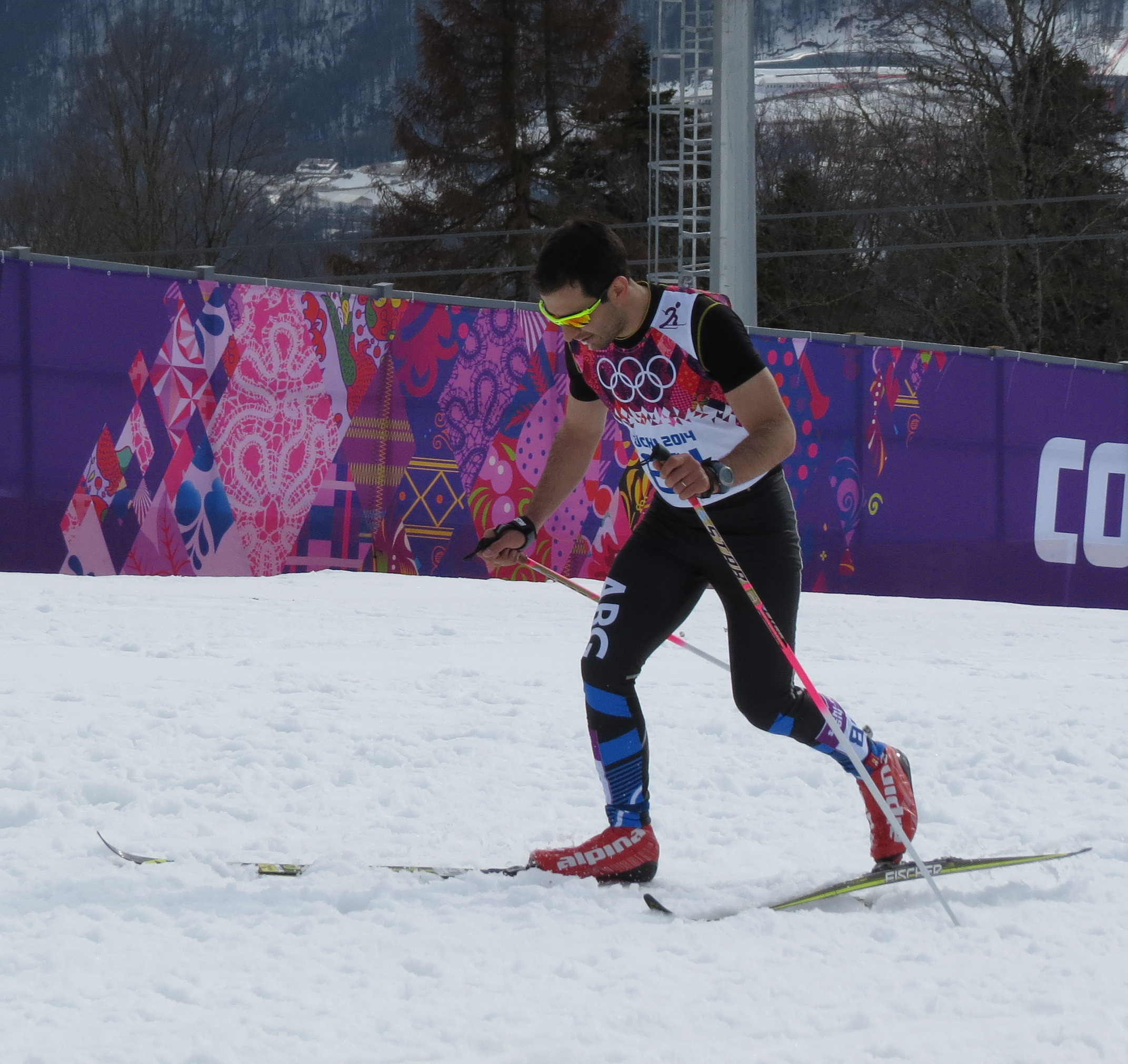 Лыжные гонки на зимних Олимпийских играх 2014 — 15 км классическим стилем (мужчины)